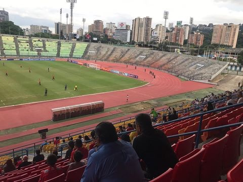 La Barra del Caracas FC decidió no entrar a las gradas durante el juego de ida de la Copa Venezuela 2019 ante Metropolitanos Fútbol Club correspondiente a los cuartos de final.